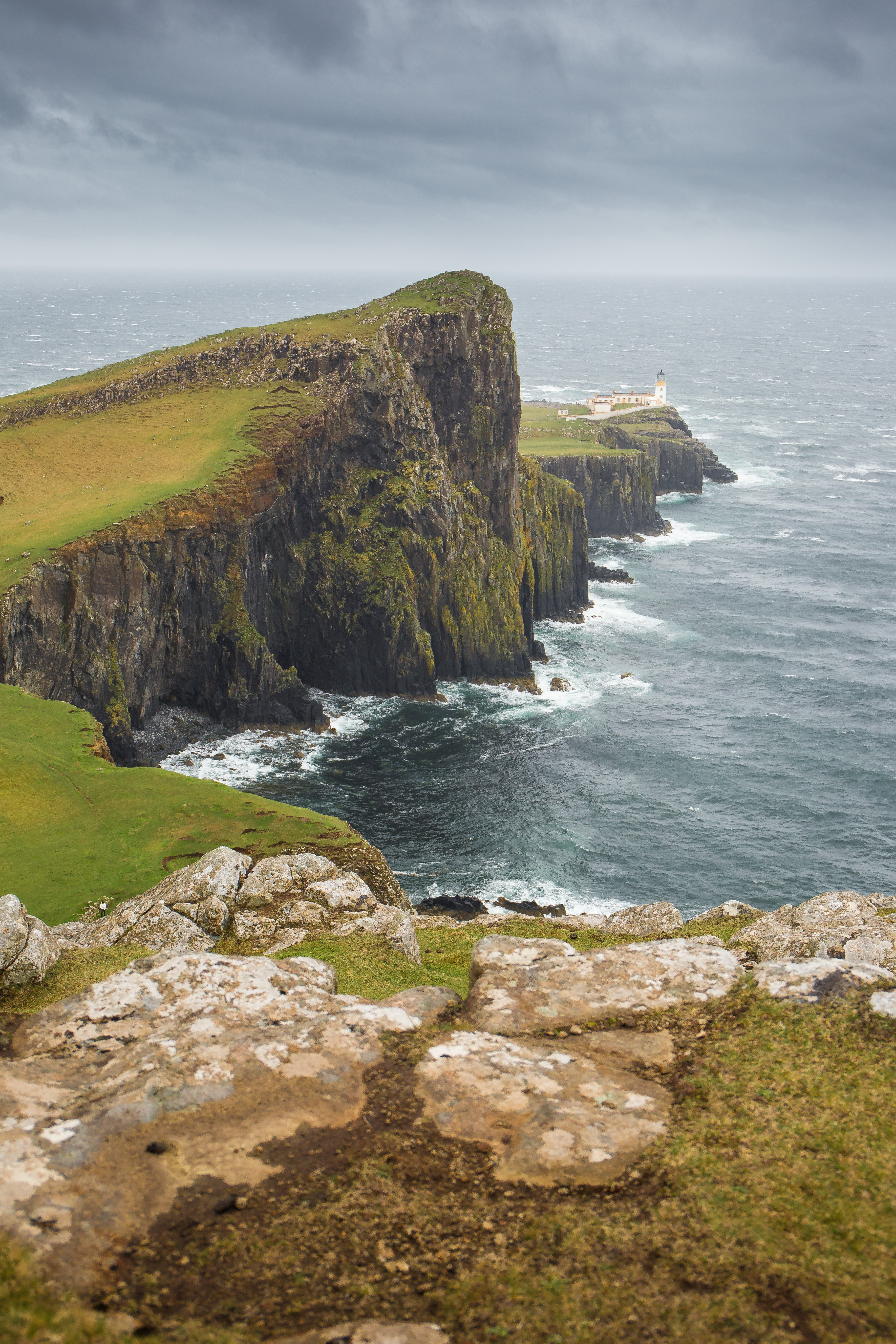 Phare de Neist Point, île de Skye